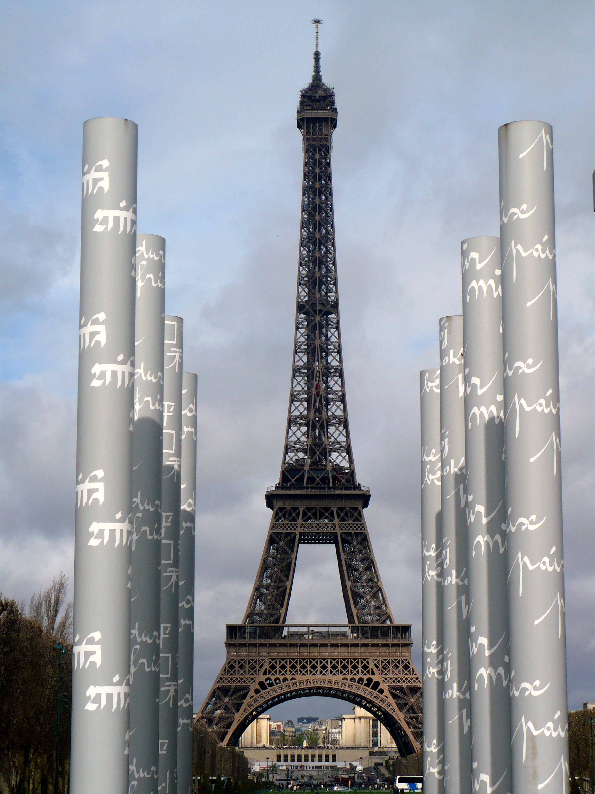 Paris2